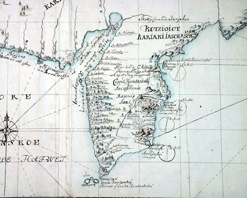 Mapo de Kamĉatko.